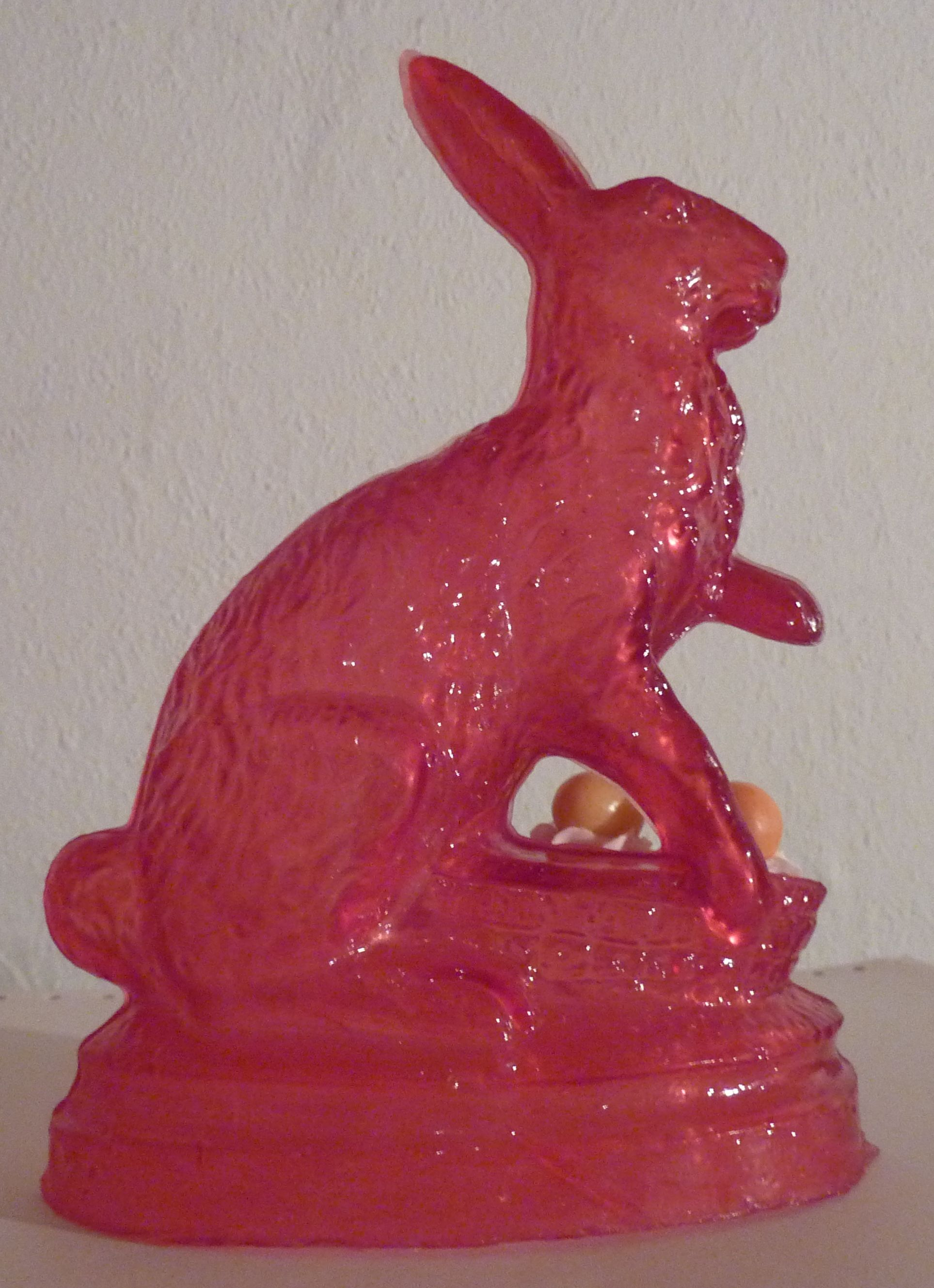 Zuckerhase